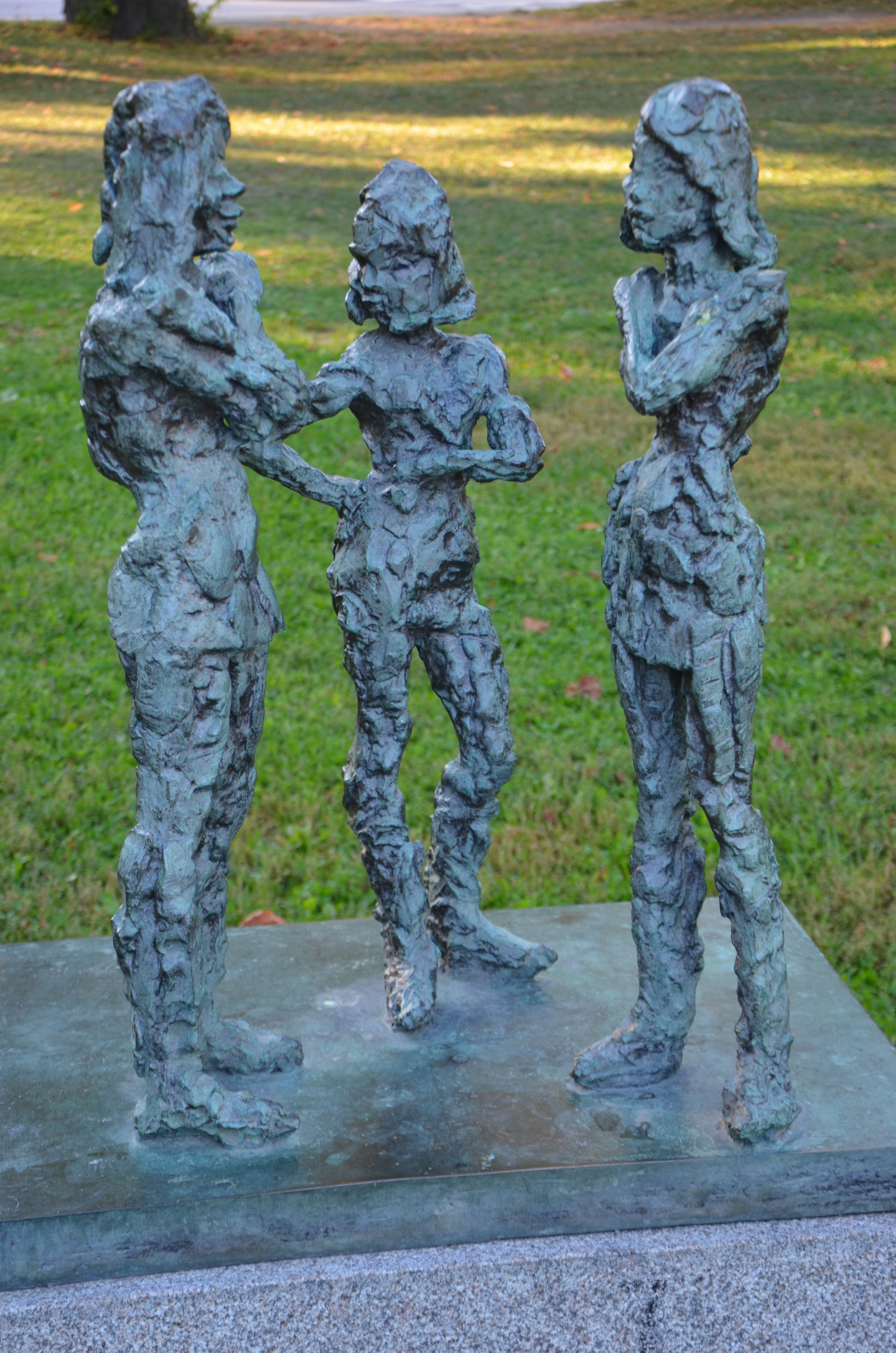 Kjolen av Anita Brusewitz-Hansson, Rålambsparken i Stockholm, brons, 1971